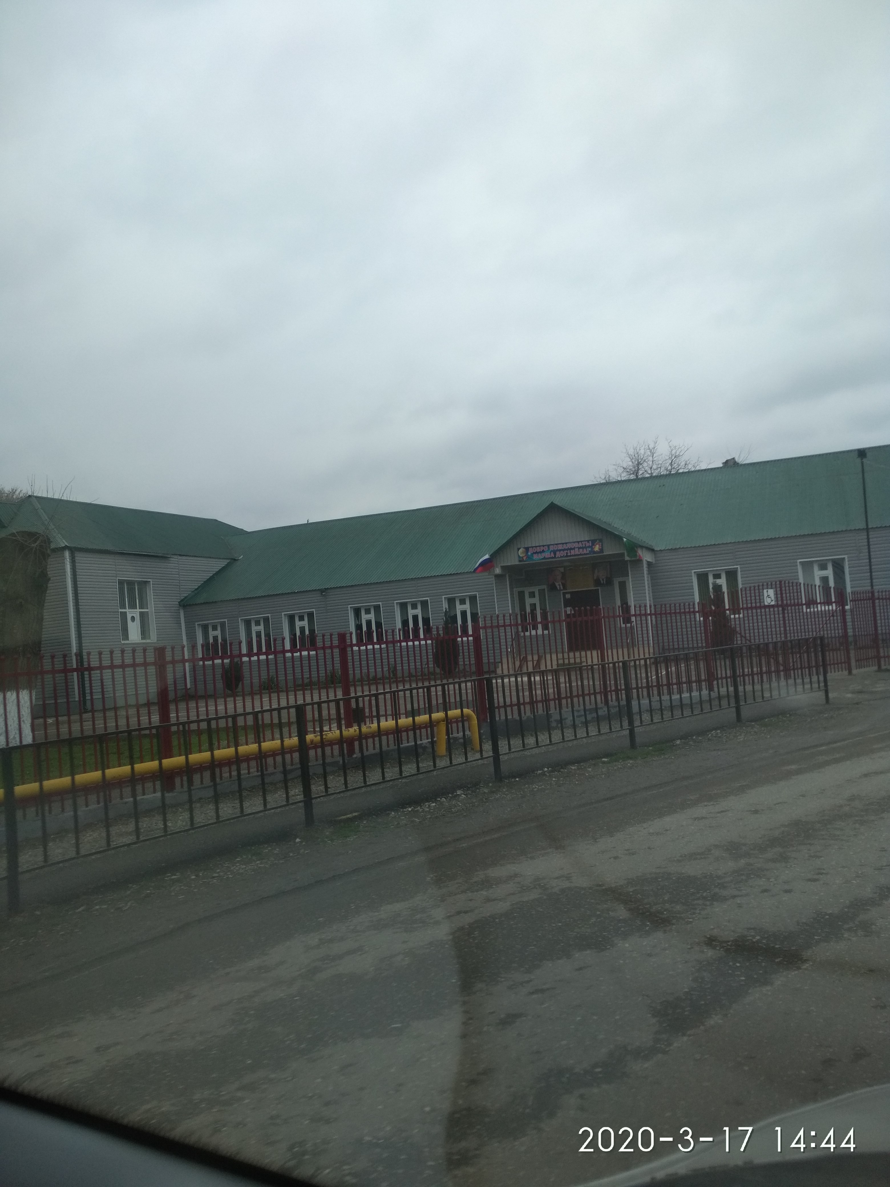 Нохчийн: Керла Шарара ишкол